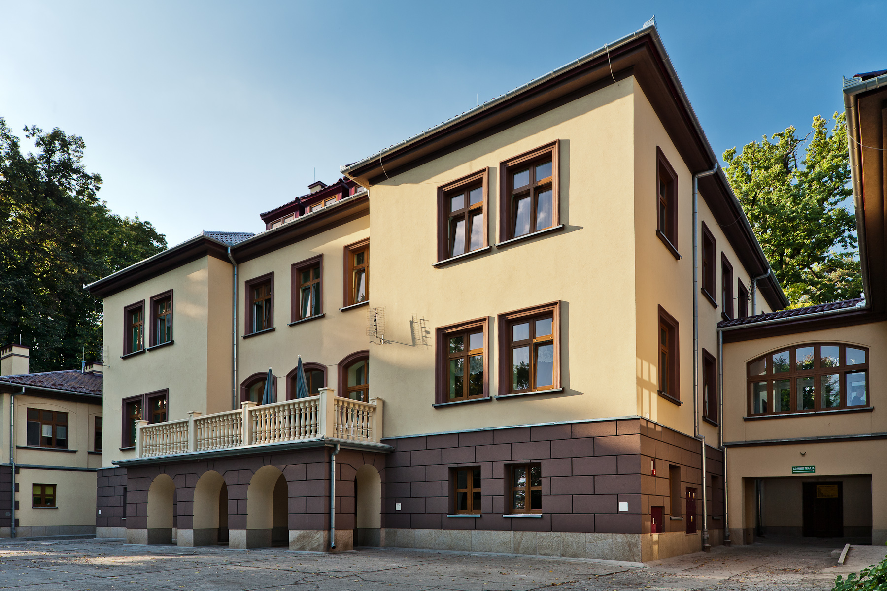 Dwór w Owczarach - tylna elewacja